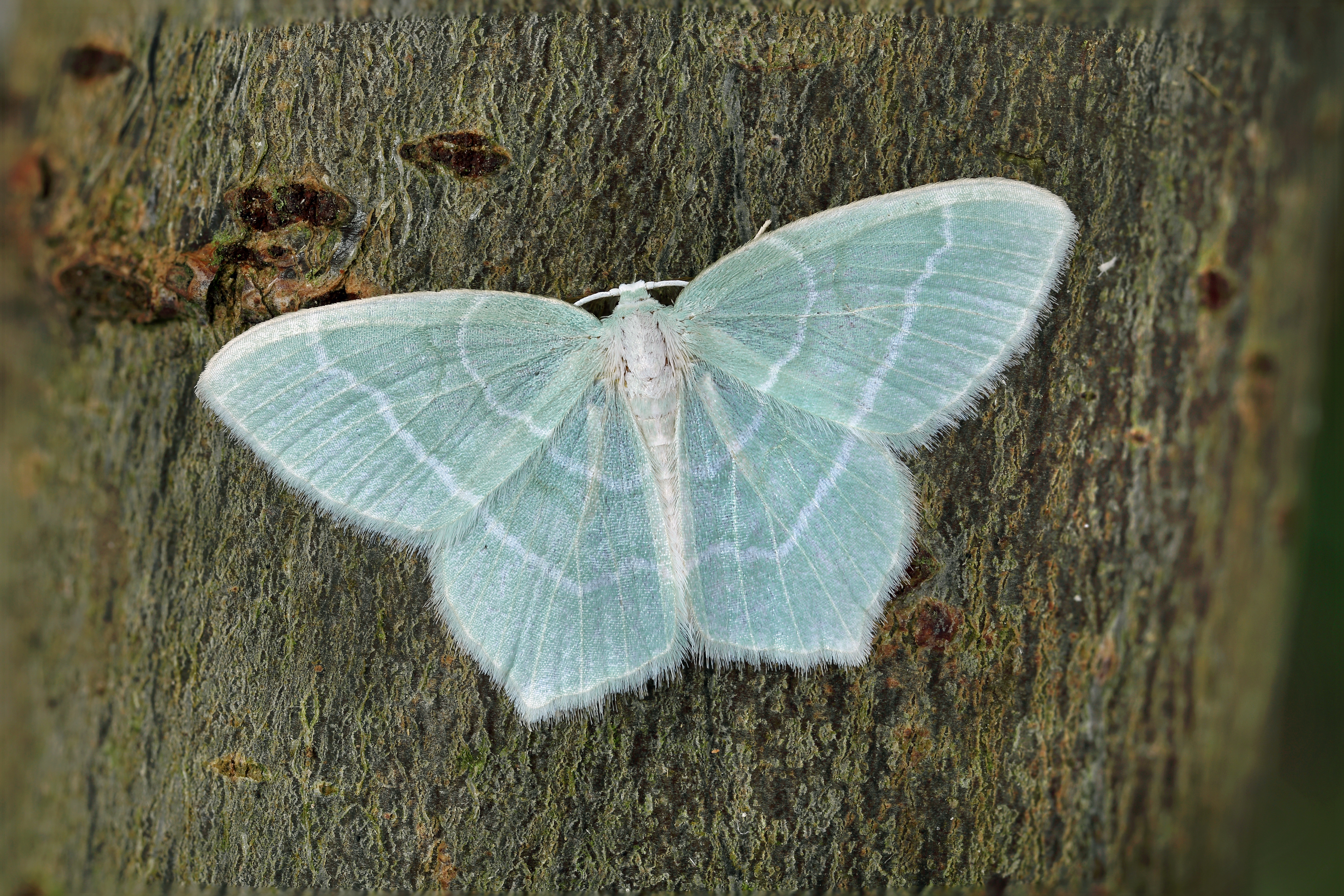 Garden trap, VC37.